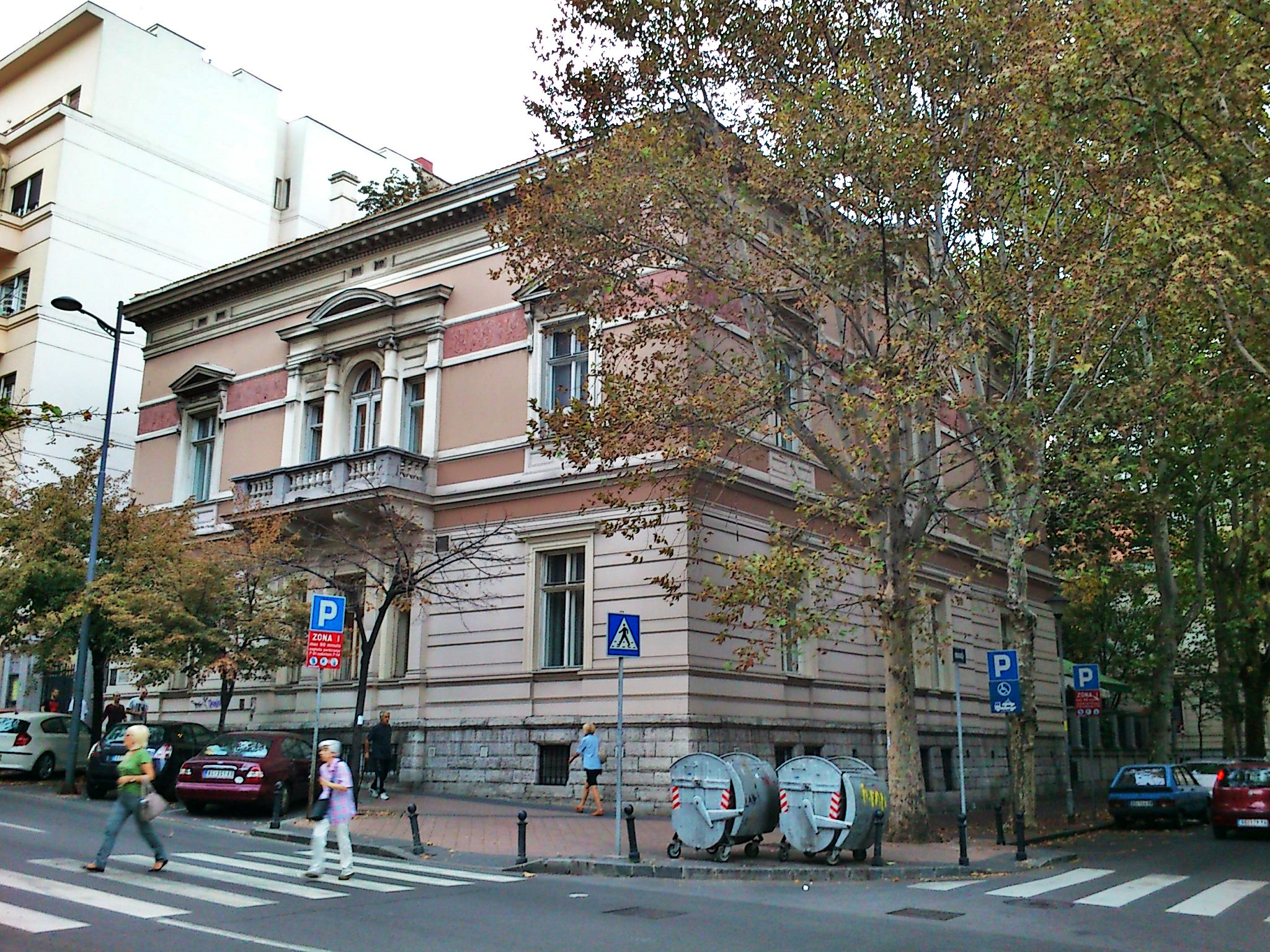 Кућа Милана Пироћанца